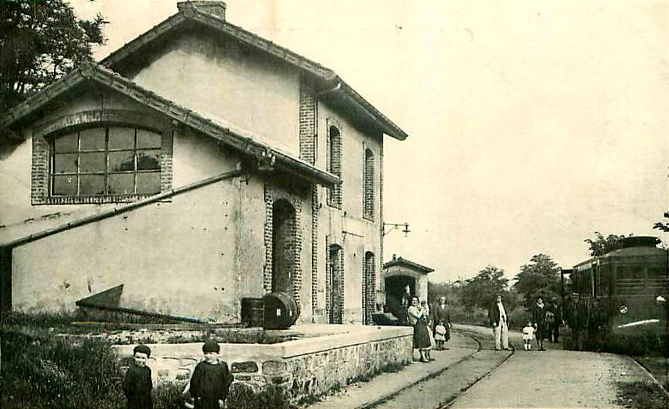 L'autorail Renault-SCEMIA n° A 1 (1924) en gare de Dammartin-Ville.